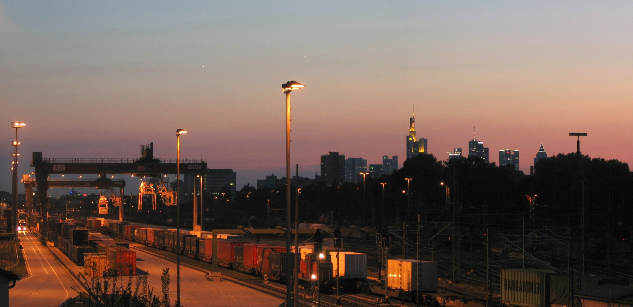 Containerbahnhof Frankfurt Main, Blick in westliche Richtung, im Hintergrund die Frankfurter Skyline, selbst fotografiert, Sept. 05